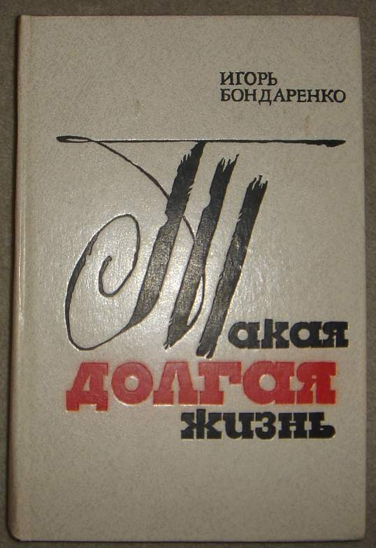 Обложка издания романа И.М. Бондаренко "Такая долдгая жизнь" Такая долгая жизнь: Роман-дилогия. — М.: Сов. писатель, 1990. — 624 с. — ISBN 5-265-01055-6.